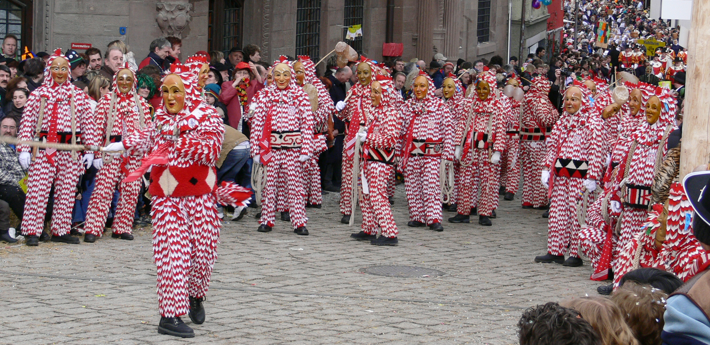 Karbatschenschneller der Plätzlerzunft Weingarten, Figur: (Rot-weißer) Plätzler Veranstaltung: Narrensprung beim Narrentreffen Meßkirch 2006